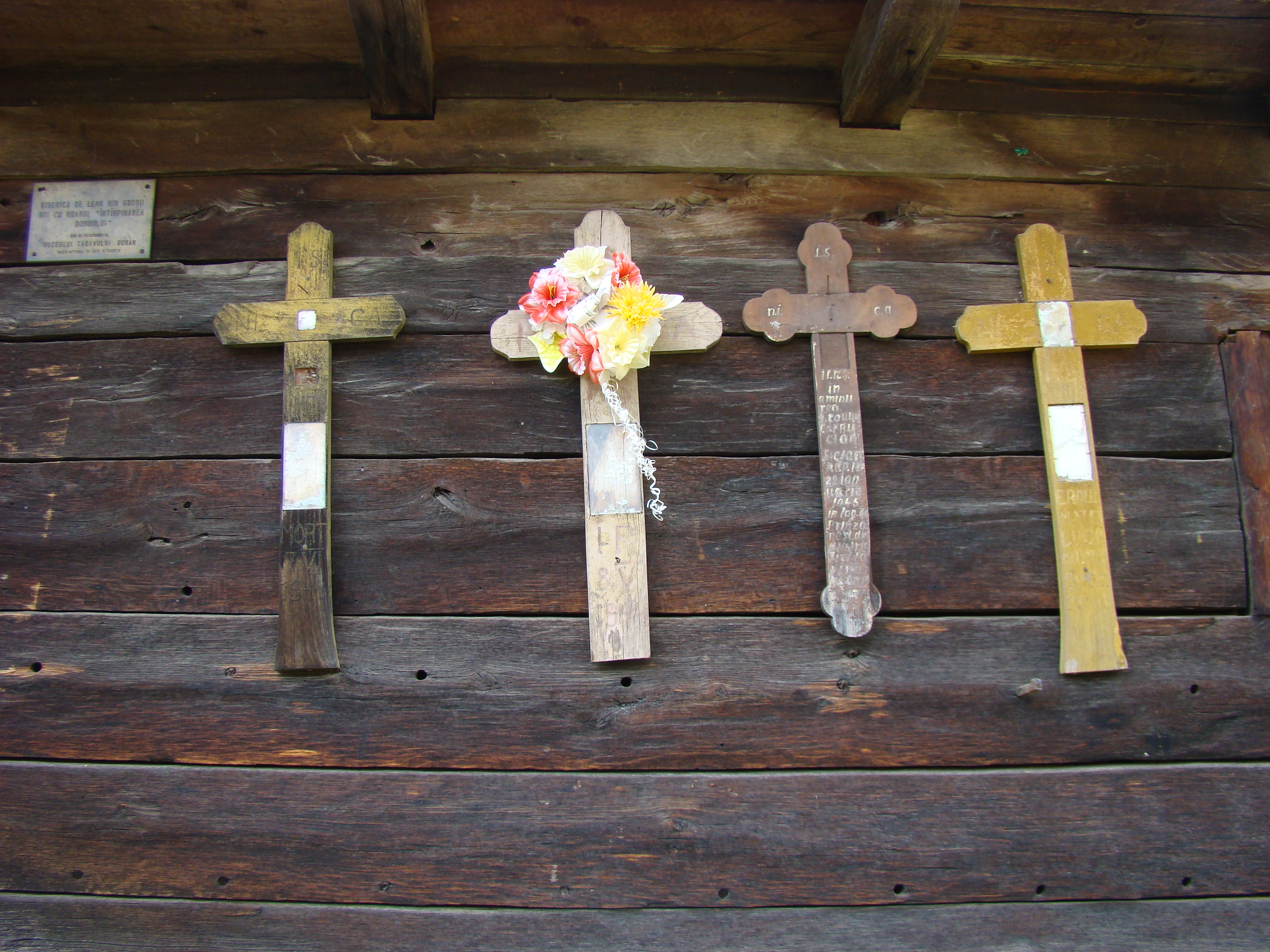 Biserica de lemn "Întâmpinarea Domnului", sat GROŞII NOI; comuna BÂRZAVA